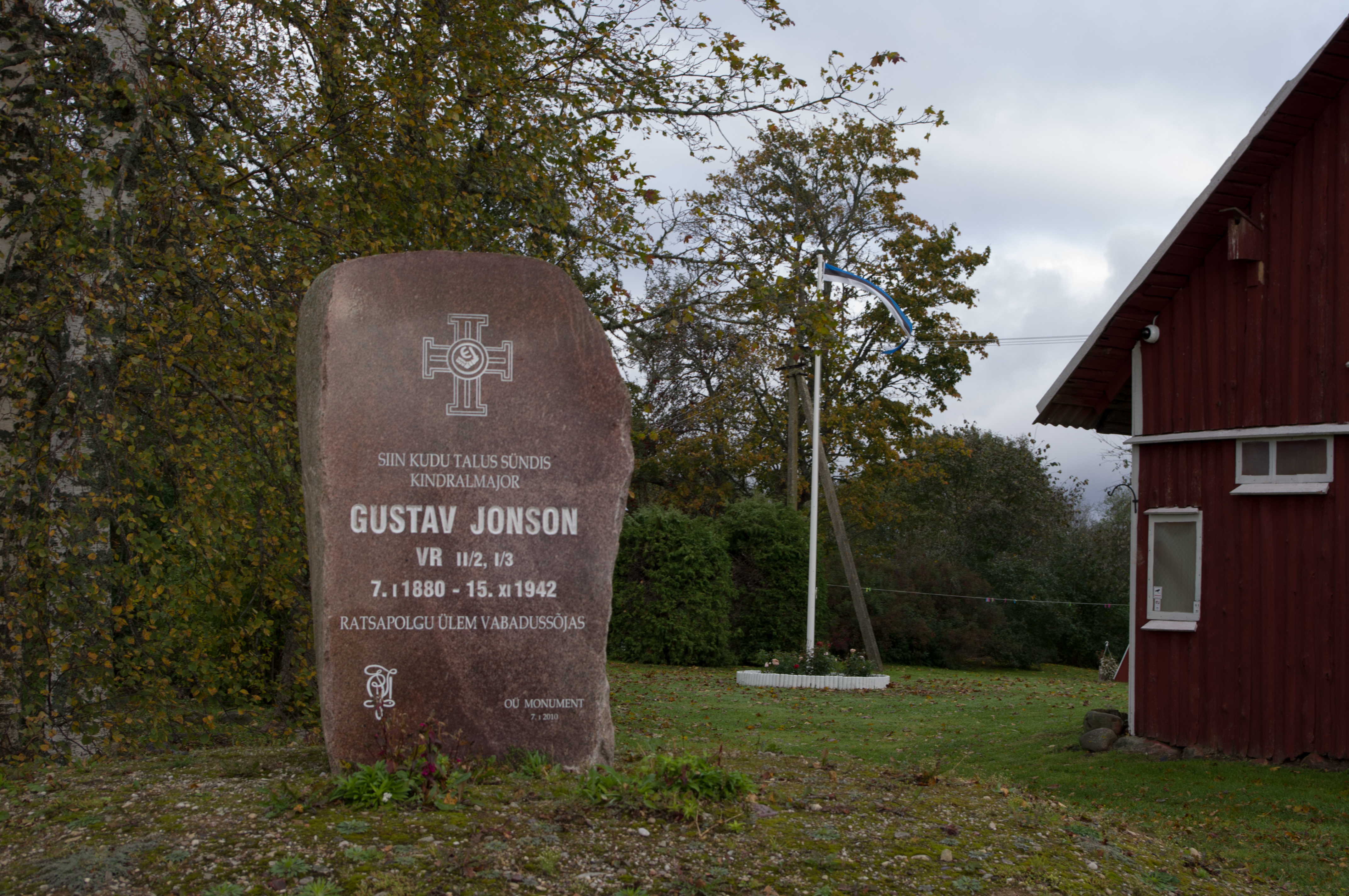 Gustav Jonsoni mälestuskivi